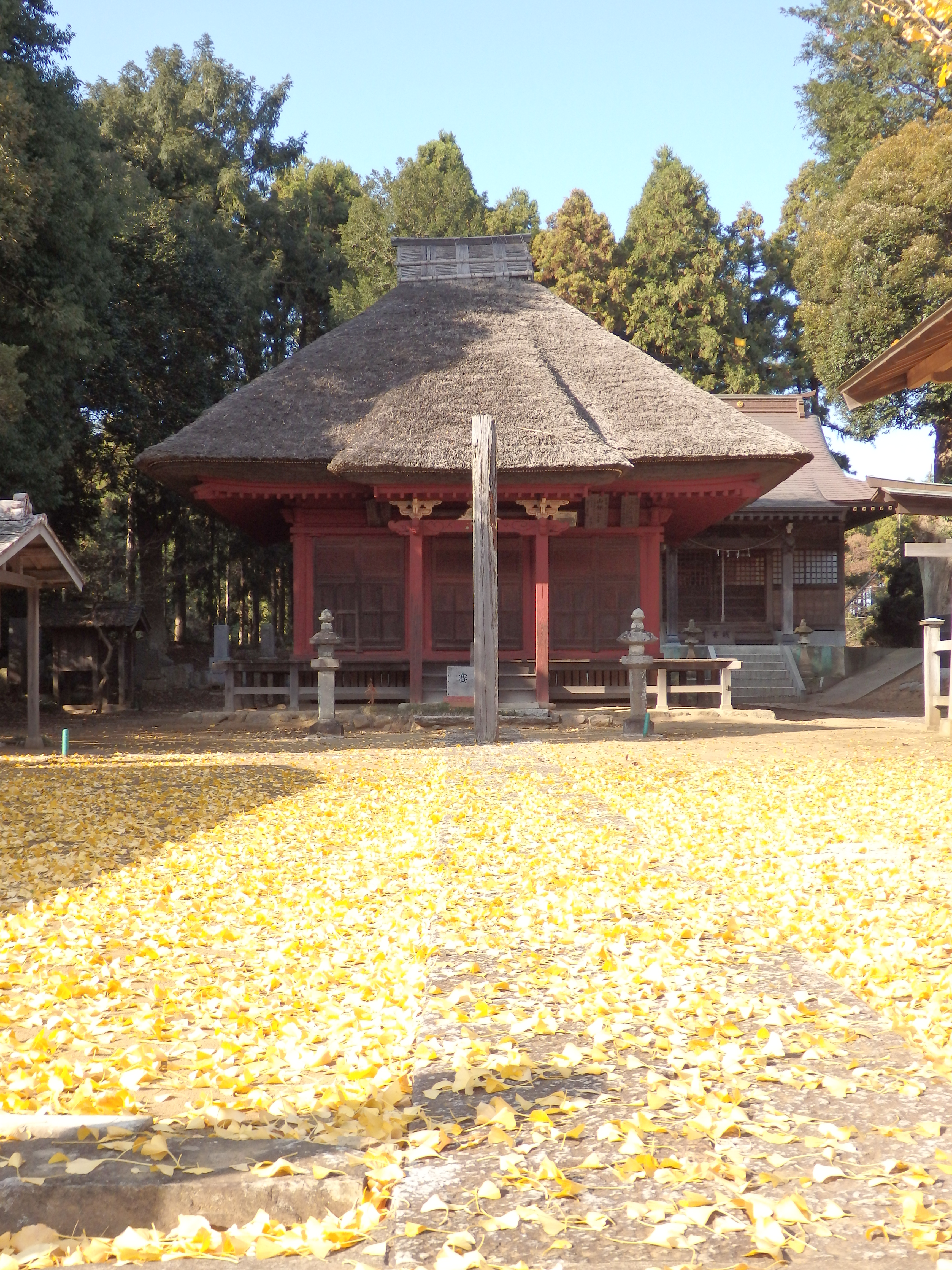 栄福寺薬師堂